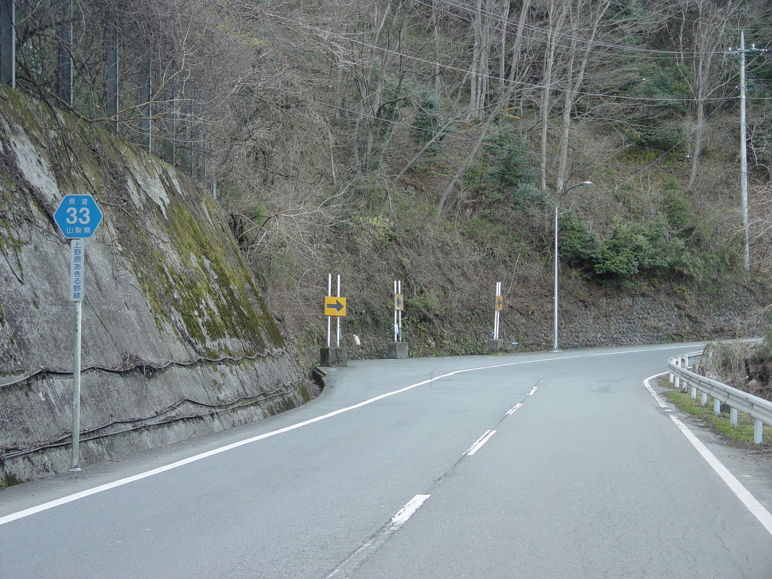 Yamanashi prefectural road route 33, Uenohara, Yamanashi, Japan ja: 山梨県道・東京都道33号上野原あきる野線、上野原市